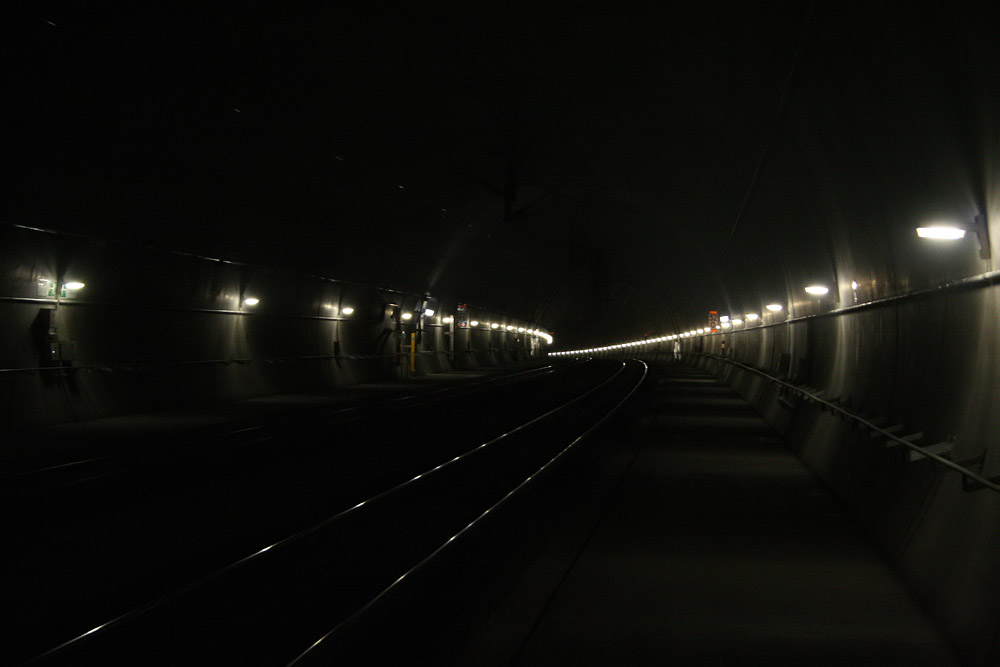 Die Tunnelröhre des Euerwangtunnels auf der NBS Ingolstadt–Nürnberg